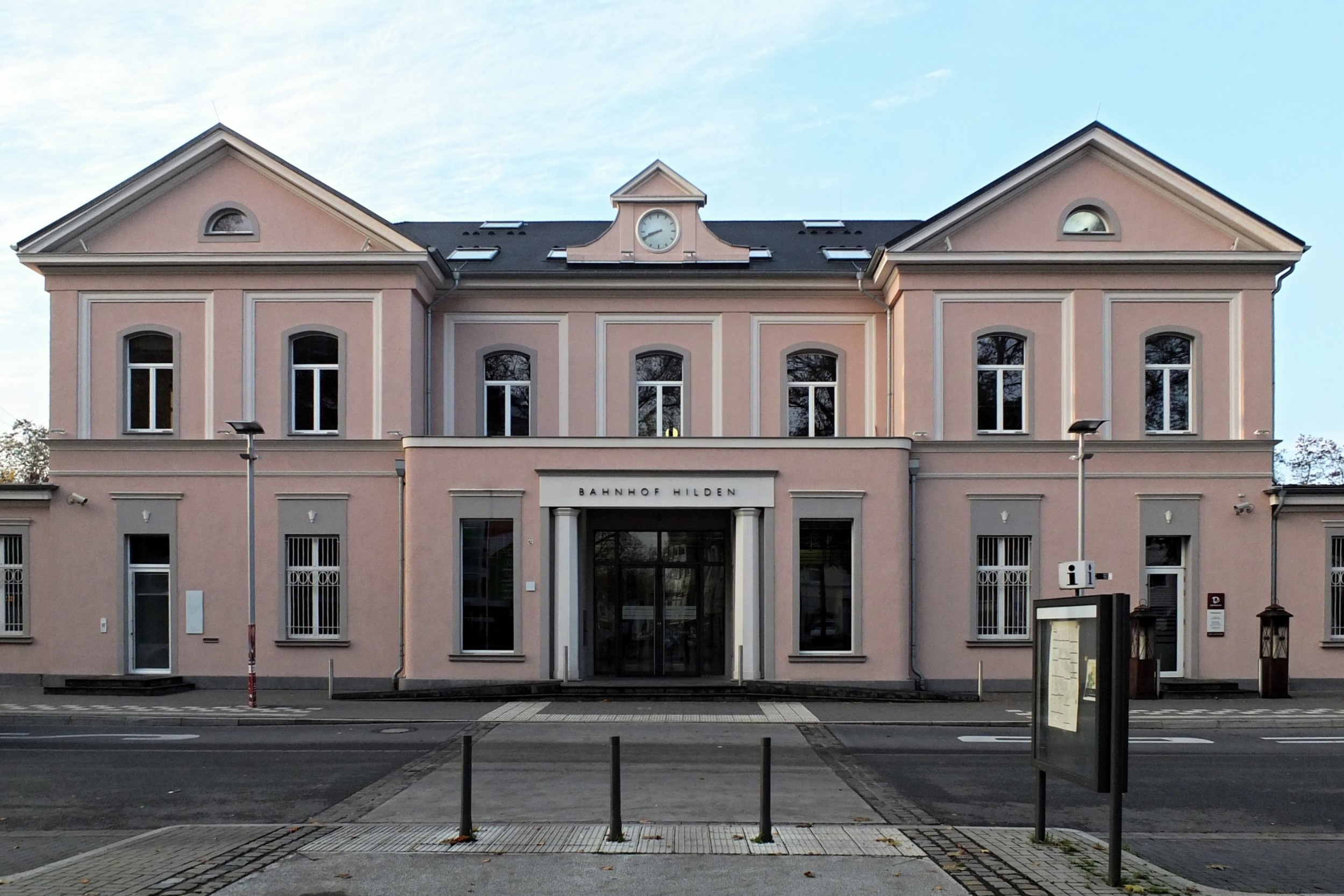 Bahnhof Hilden, erbaut 1874, Hilden, Bahnhofsallee 5 This is a photograph of an architectural monument.